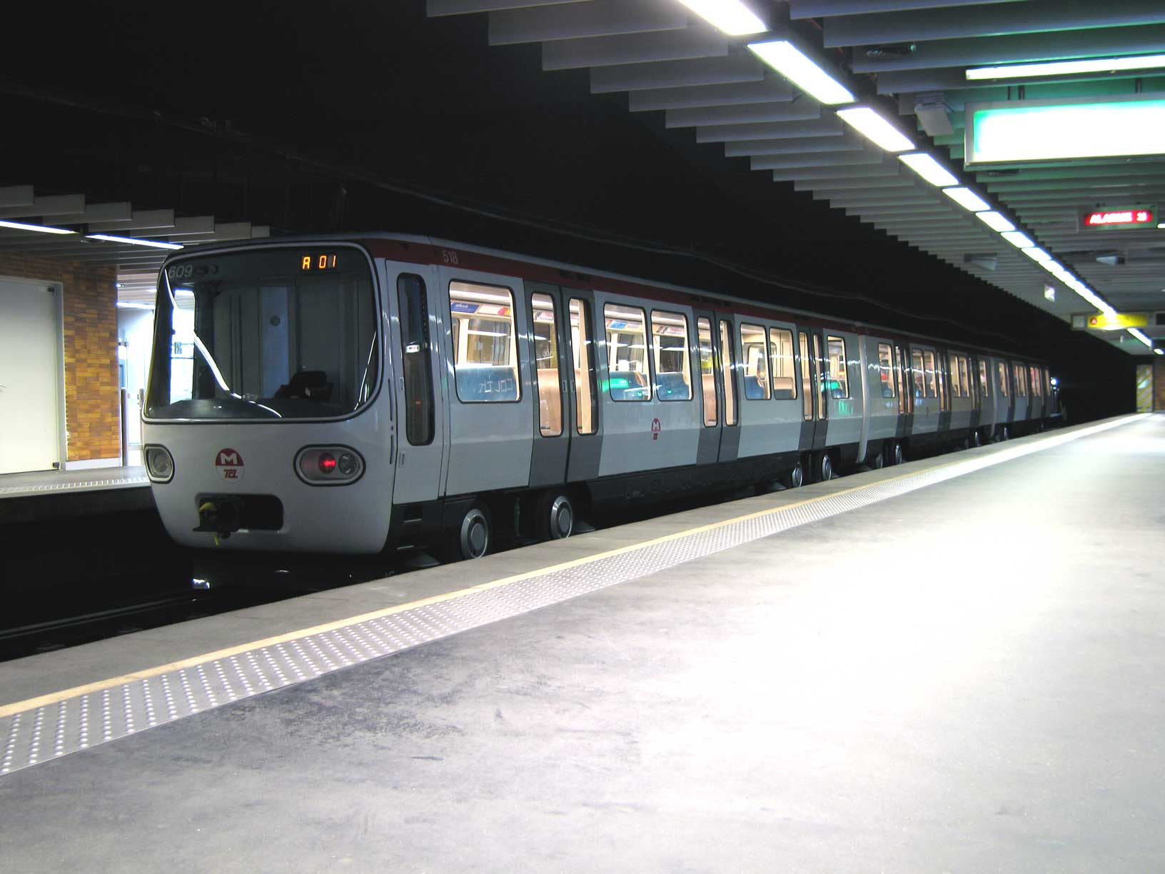 Rame de la ligne A, Lyon, France